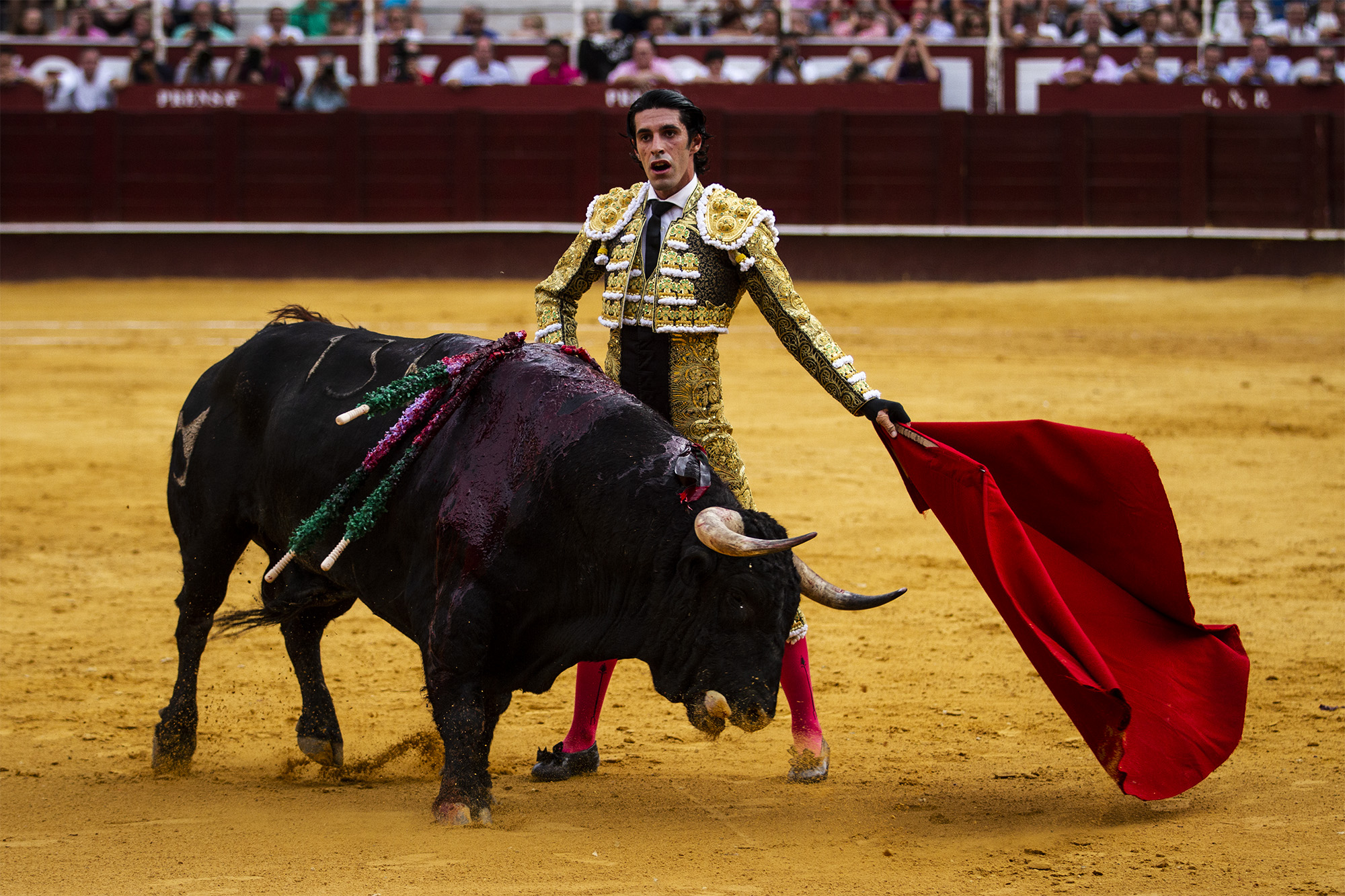 Alejandro Talavante toreando al natural, mirando al tendido.